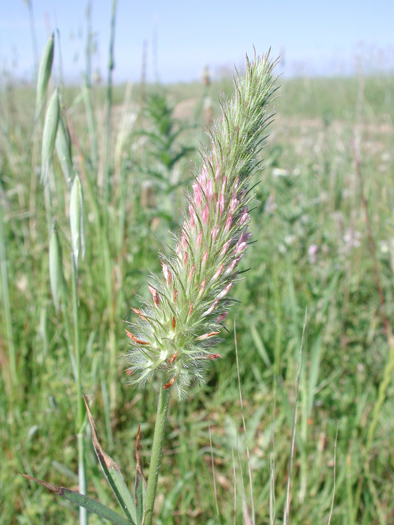 Infiorescenza di Trifolium angustifolium